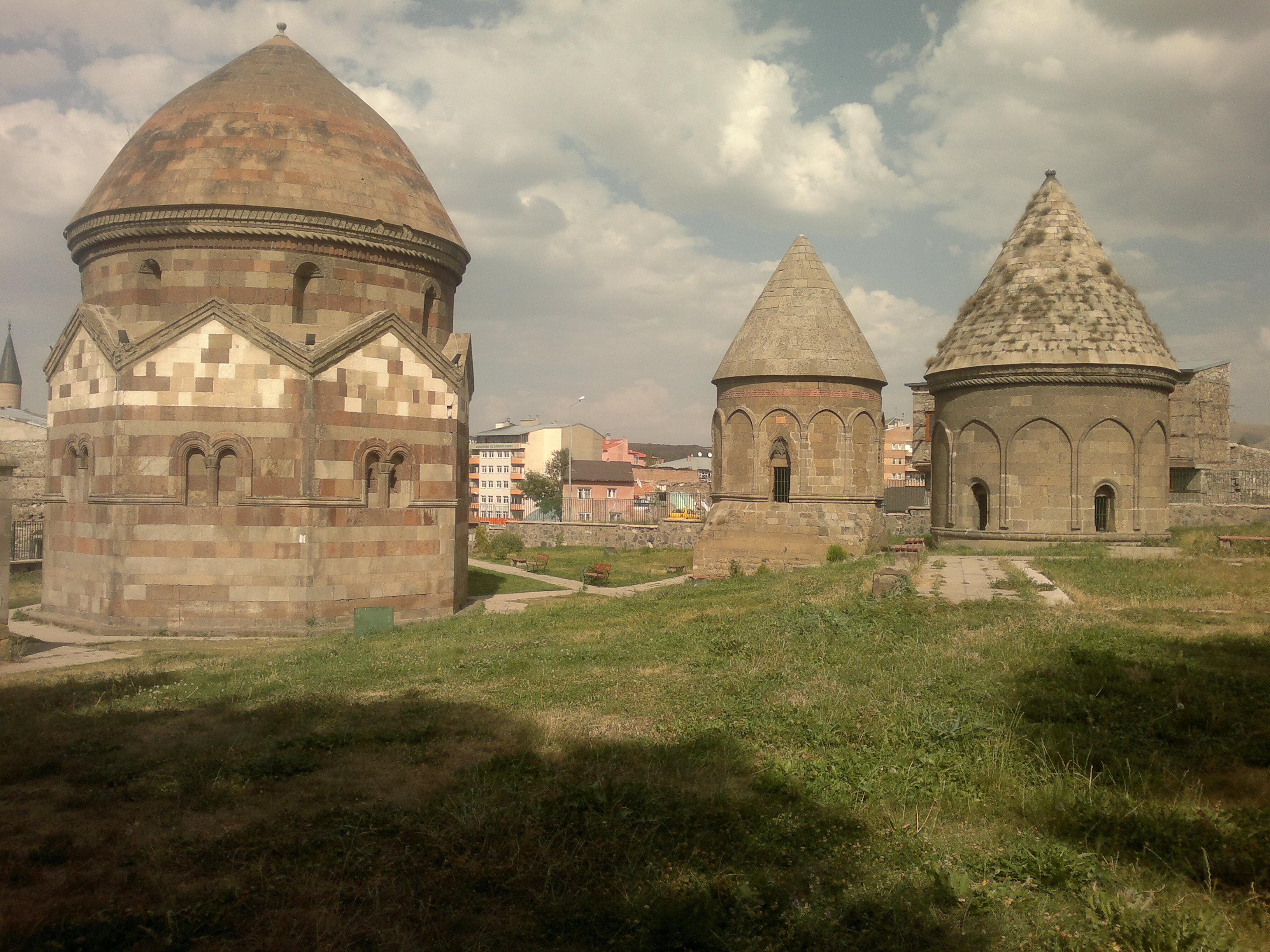 Türkiye'de Erzurum ili şehir merkezinde bulunan 12. ve 14. yüzyıllarda yapılan Üç Kümbetler.